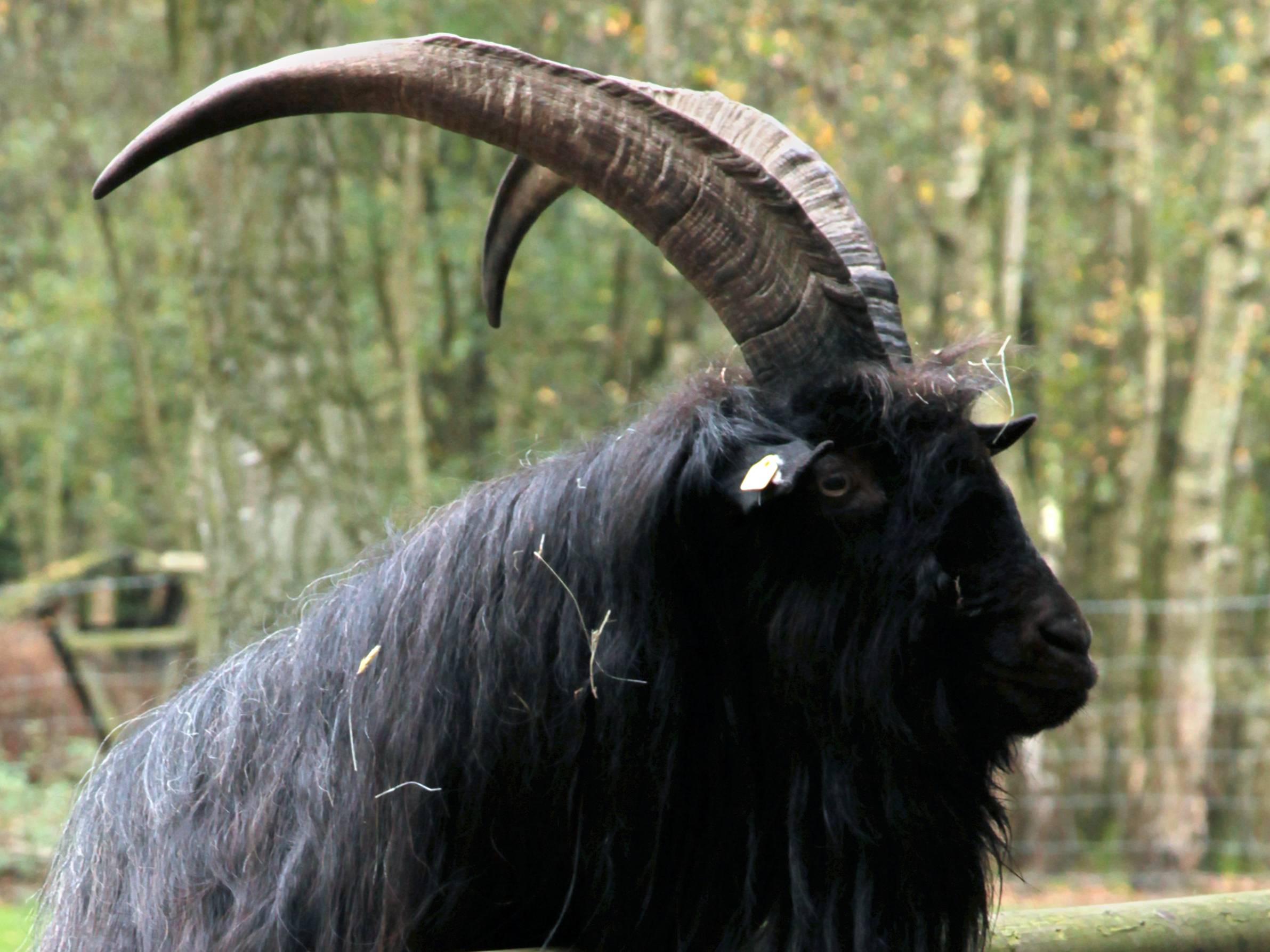 Walliser Schwarzhalsziege im Wildfreigehege Nöttler Berg in Saerbeck.